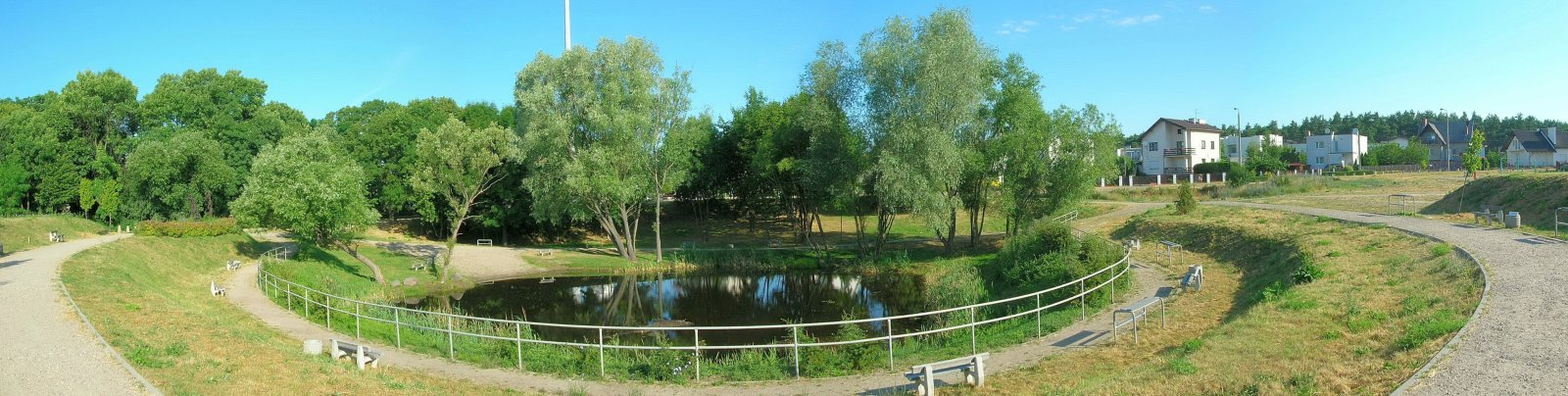 Park na Osowej Górze w Bydgoszczy